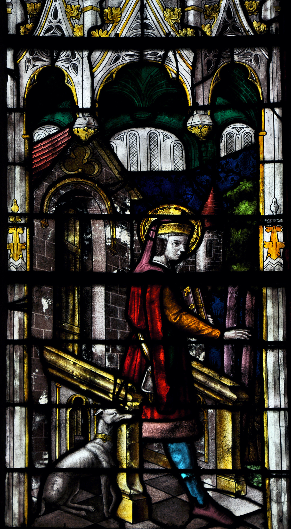 Détail d'un vitrail (baie 0) de l'église Saint-Taurin à Evreux: saint Taurin aux portes d'Évreux (vers 1450). (Les vitraux de Haute-Normandie, Éditions du CNRS, Paris 2001, p. 163, ISBN 2-271-05548-2)